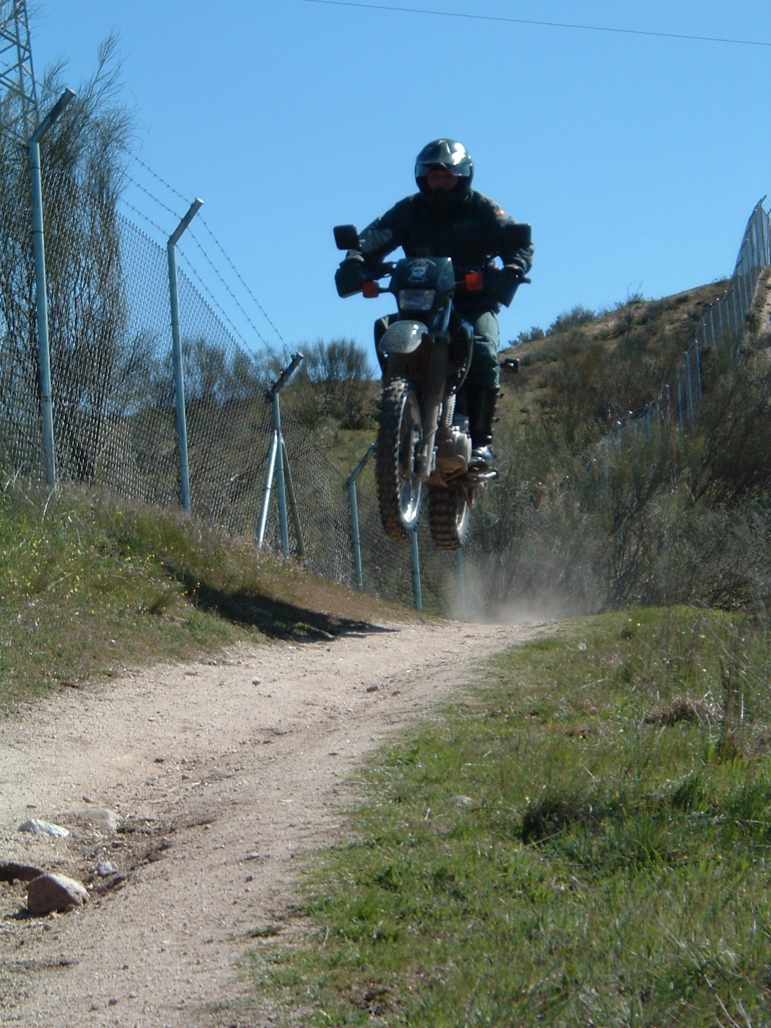 Patrullas del SEPRONA